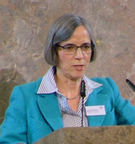 11. Mitgliederversammlung DOSB in der Frankfurter Paulskirche. Die DOSB-Mitgliedsorganisationen stimmte in einer außerordentlichen Mitgliederversammlung einstimmig dafür, dass Deutschland mit der Freien und Hansestadt Hamburg sich um die Olympischen und Paralympischen Spiele 2024 und gegebenfalls 2028 bewirbt. Hier: Sylvia Schenk